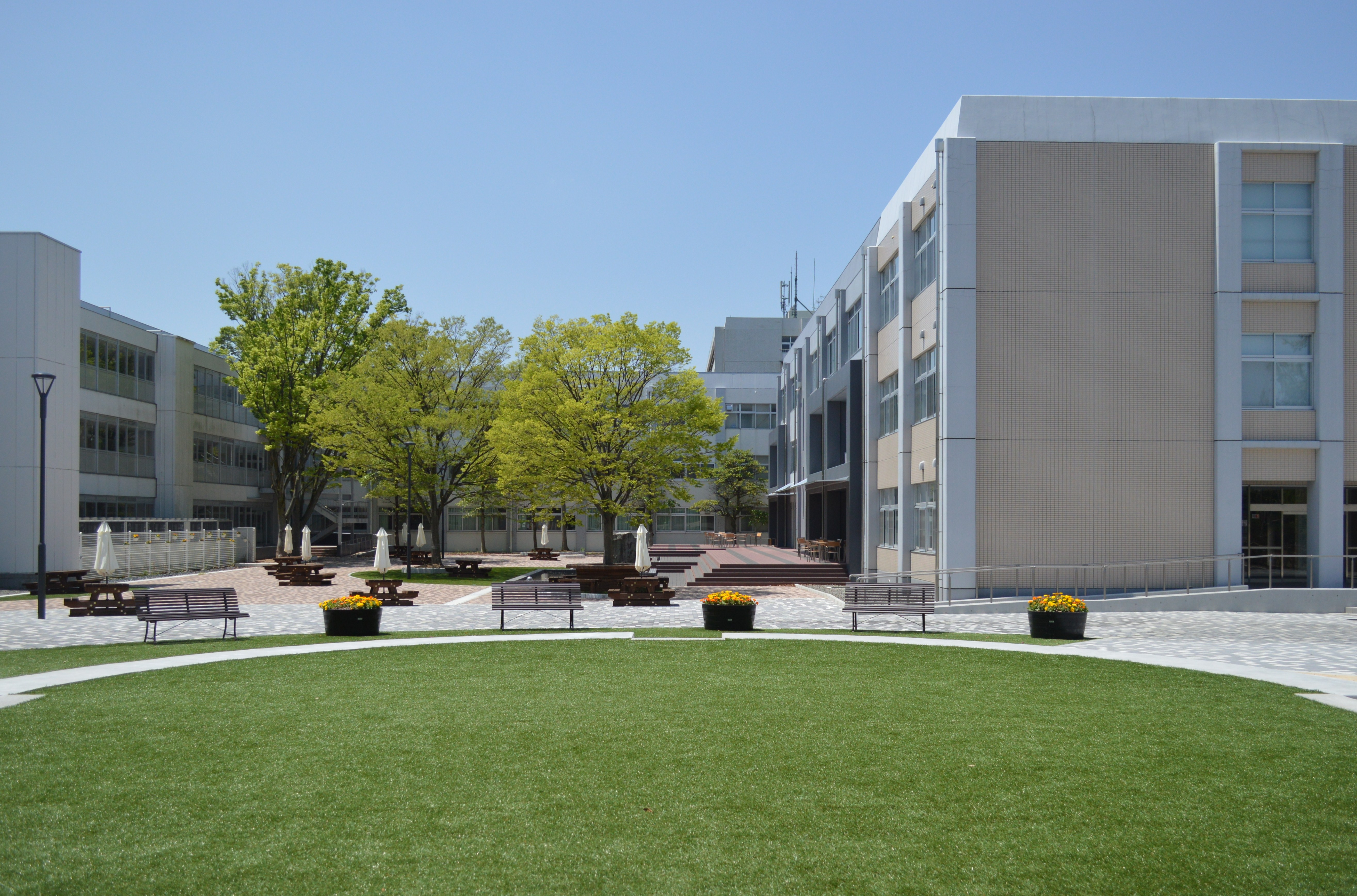 愛知教育大学 左・第一共通棟、右・情報処理センター棟